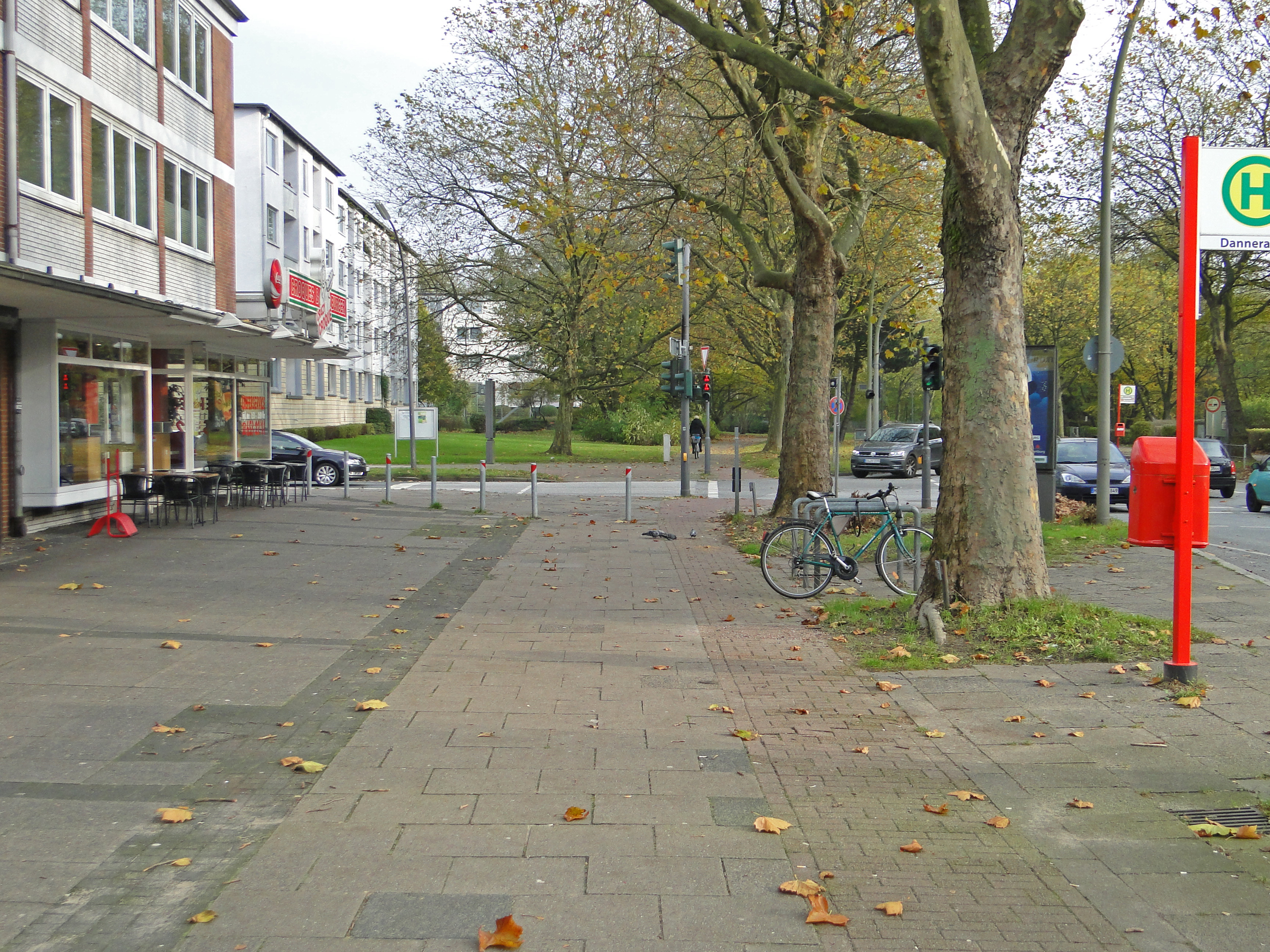 Bushaltestelle Dannerallee. Vorgesehener Standort des U-Bahnhof Dannerallee und möglicher Standort des Startschachts der U4 Verlängerung.